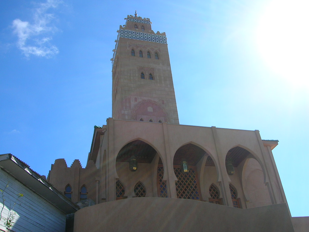 Mezquita de Coquimbo, Chile.